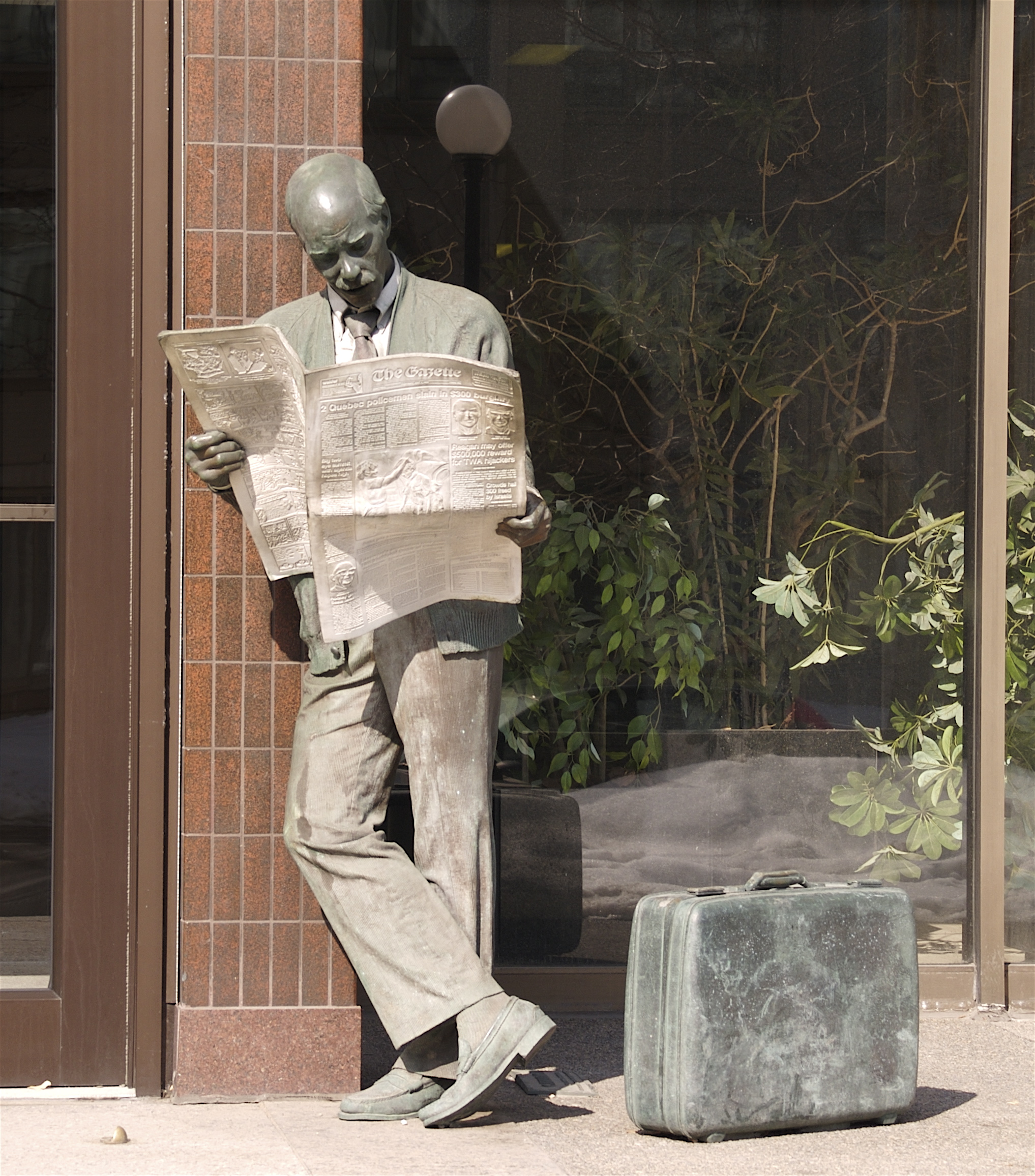 Gazette Reader